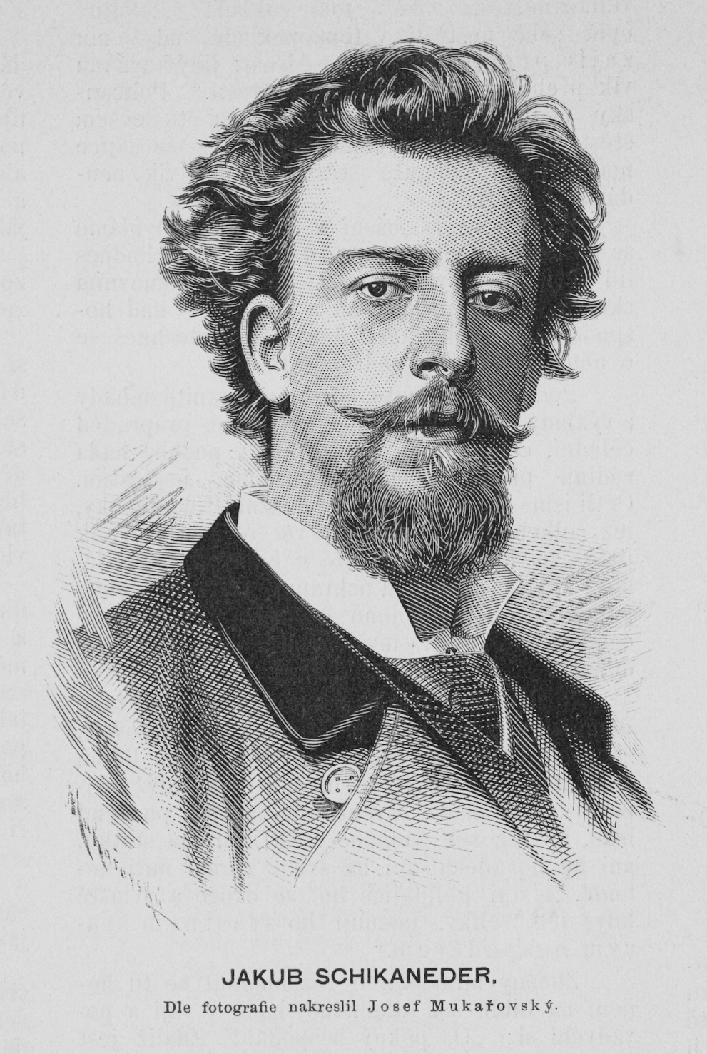 Portrait of Jakub Schikaneder (1855 - 1924), Czech painter